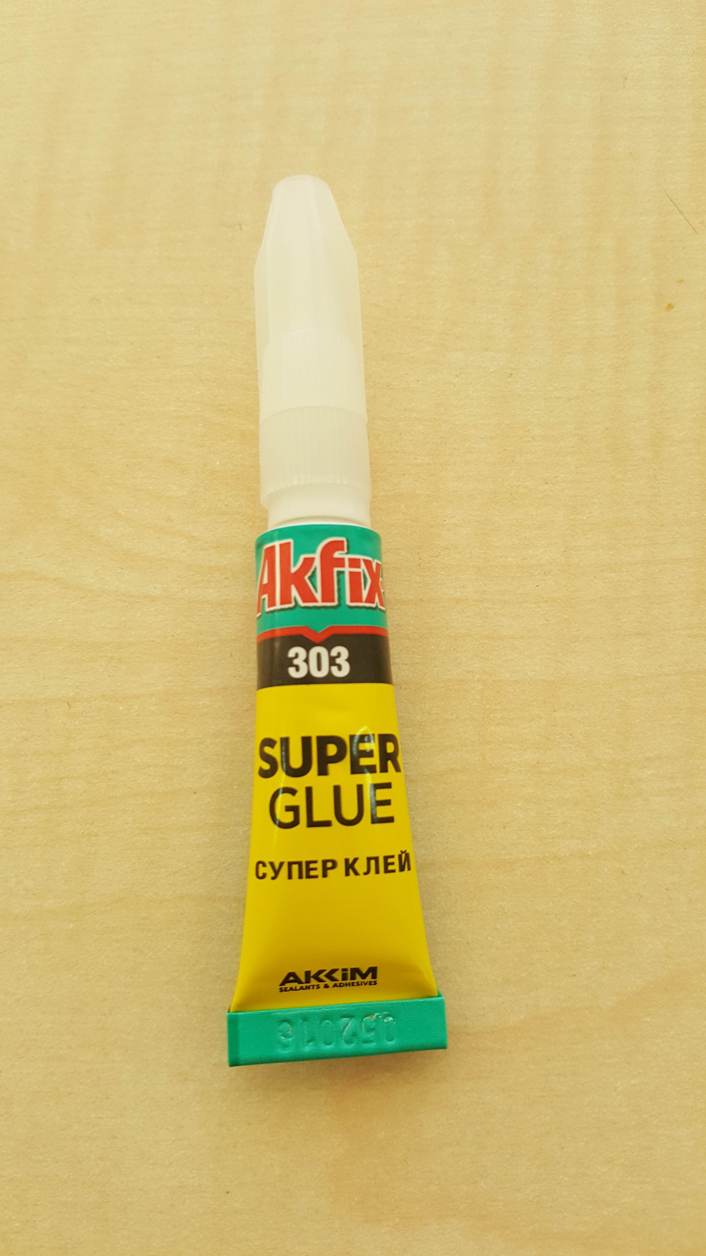 Akfix 303 Super Glue is low viscosity superfast instant glue based on cyanoacrylate adhesive. It is excellent where extremely fast cure is required.